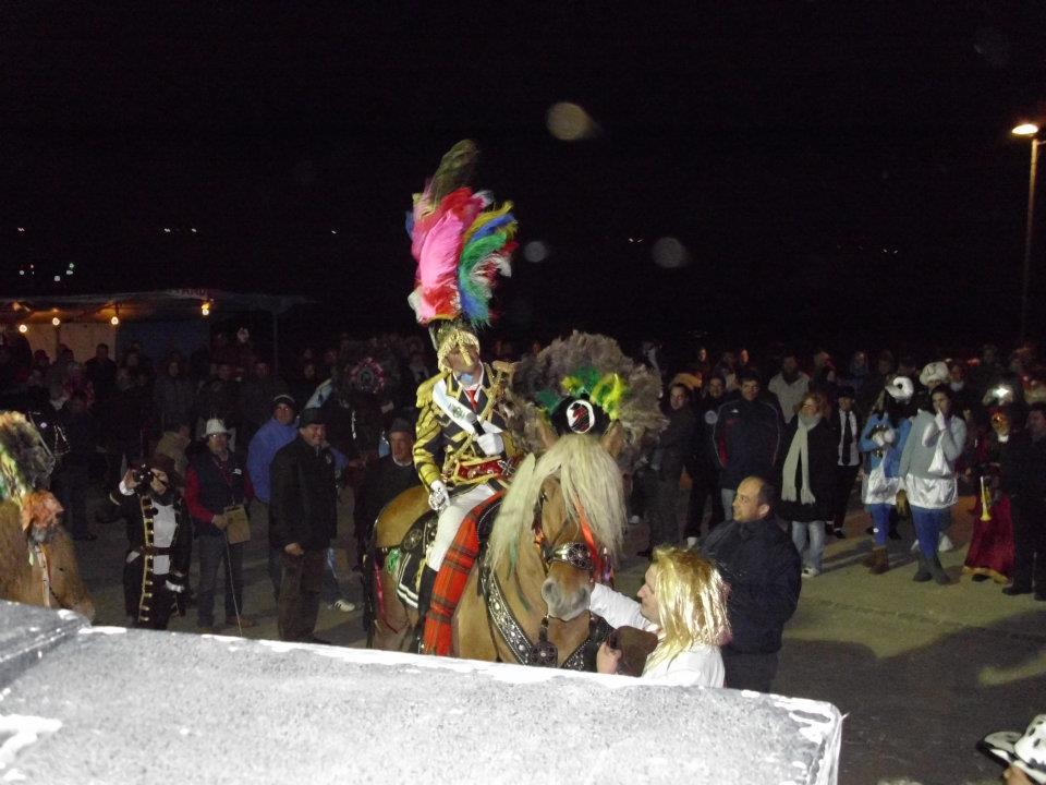 Carnavales